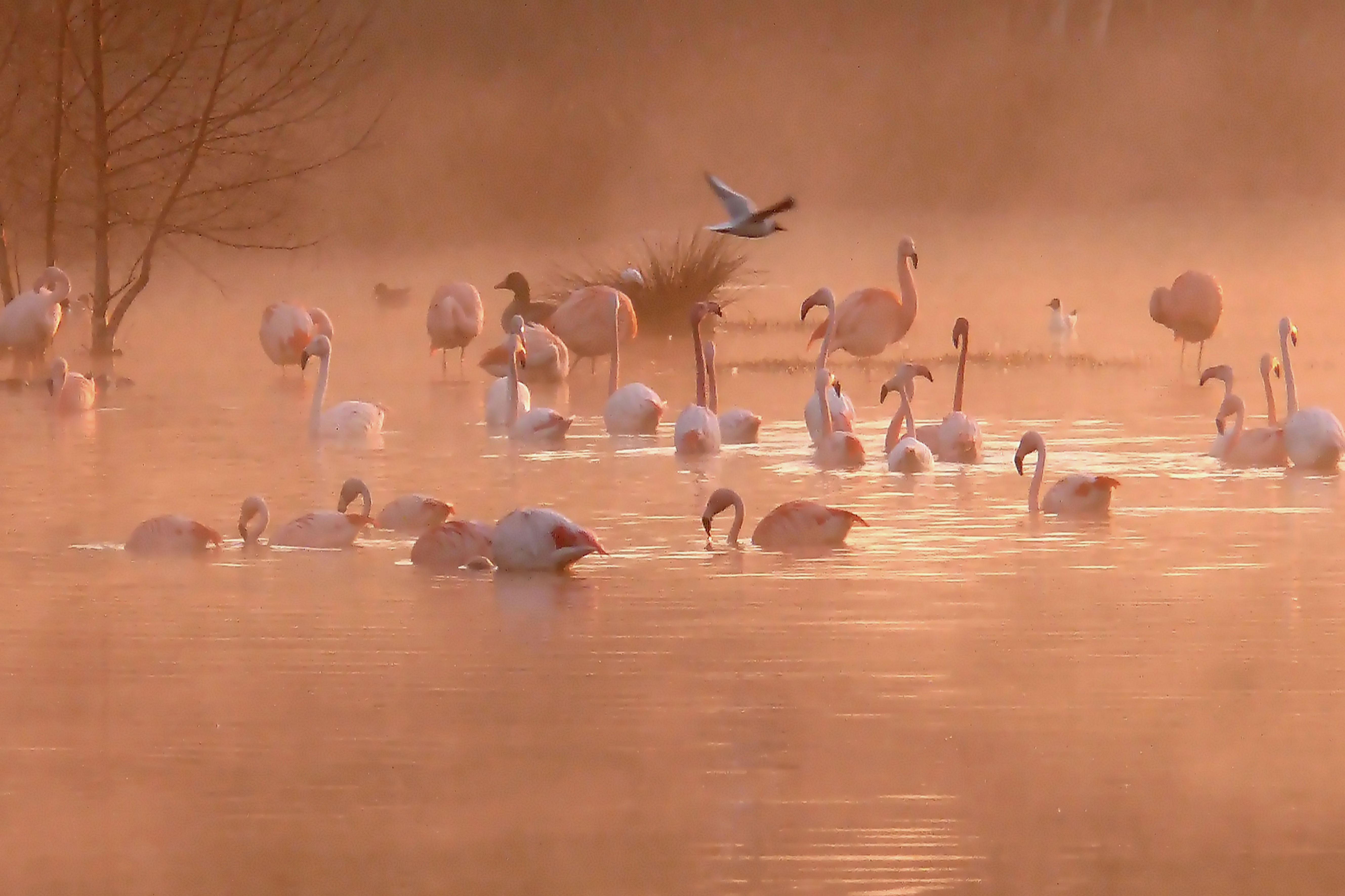 Flamingos (Phoenicopterus chilensis) im Morgenrot bei sich niederlegendem Nebel morgens um ca. 07:00 Uhr. Freilebende Flamingos aus dem NSG Zwillbrocker Venn (48691 Vreden) aus ca. 200 Meter Entfernung.